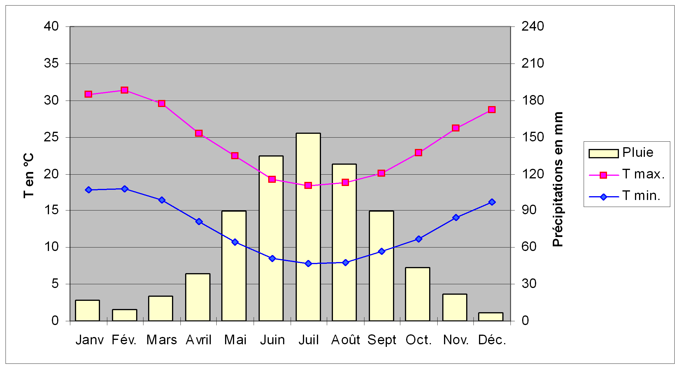 Diagramme climatique de la ville de Perth (Australie), comprenant deux courbes, représentant les températures maximales et minimales, et un histogramme, représentant la pluviométrie, pour les douze mois de l'année.